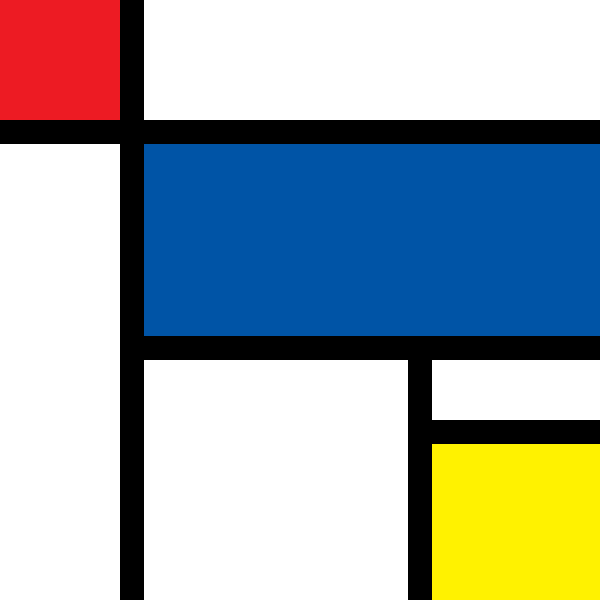 Grid in Piet Mondrian style